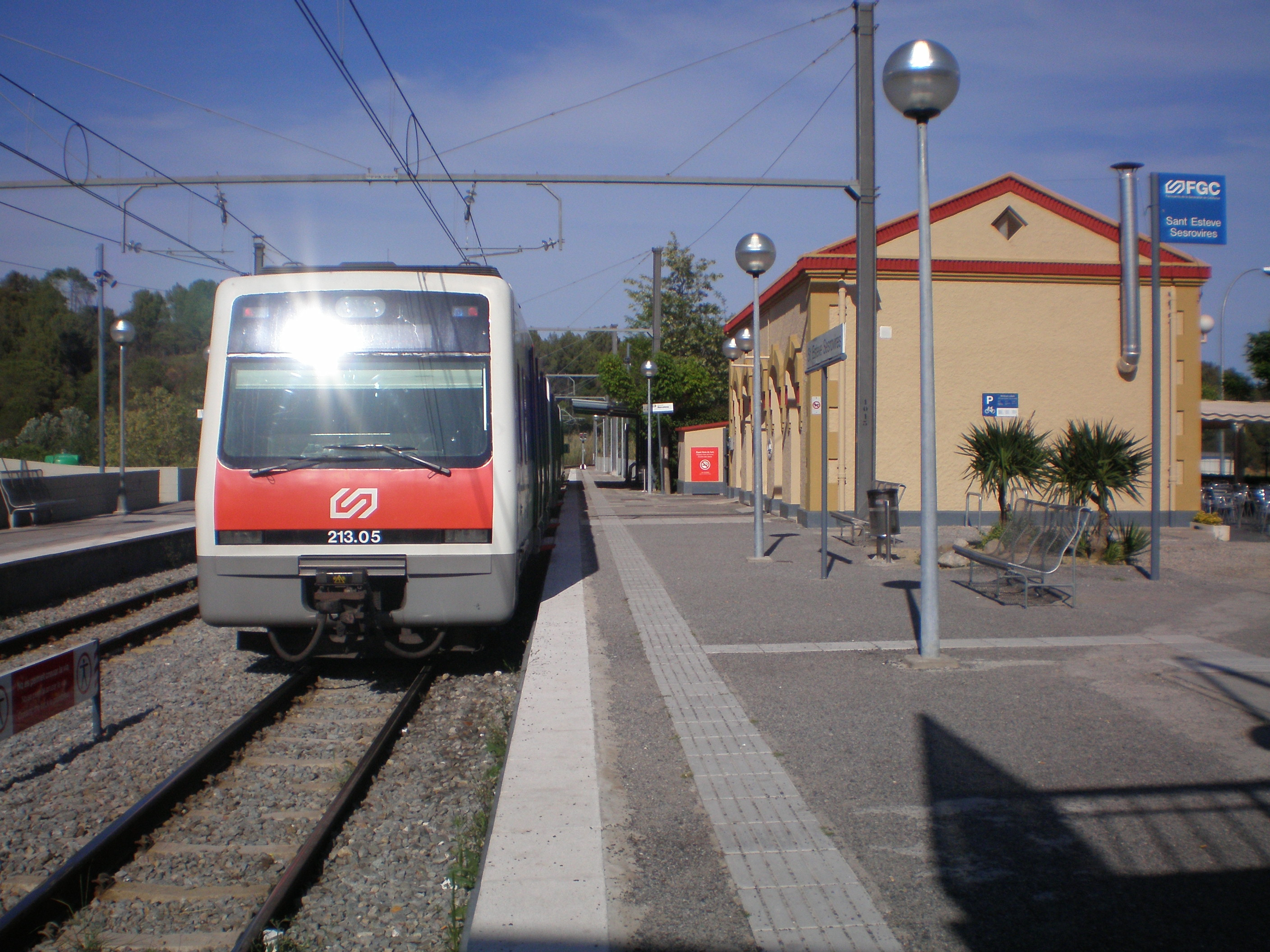 Imatge d'una unitat 213 aturada al costat de l'edifici de viatgers de l'estació de Sant Esteve Sesrovires.